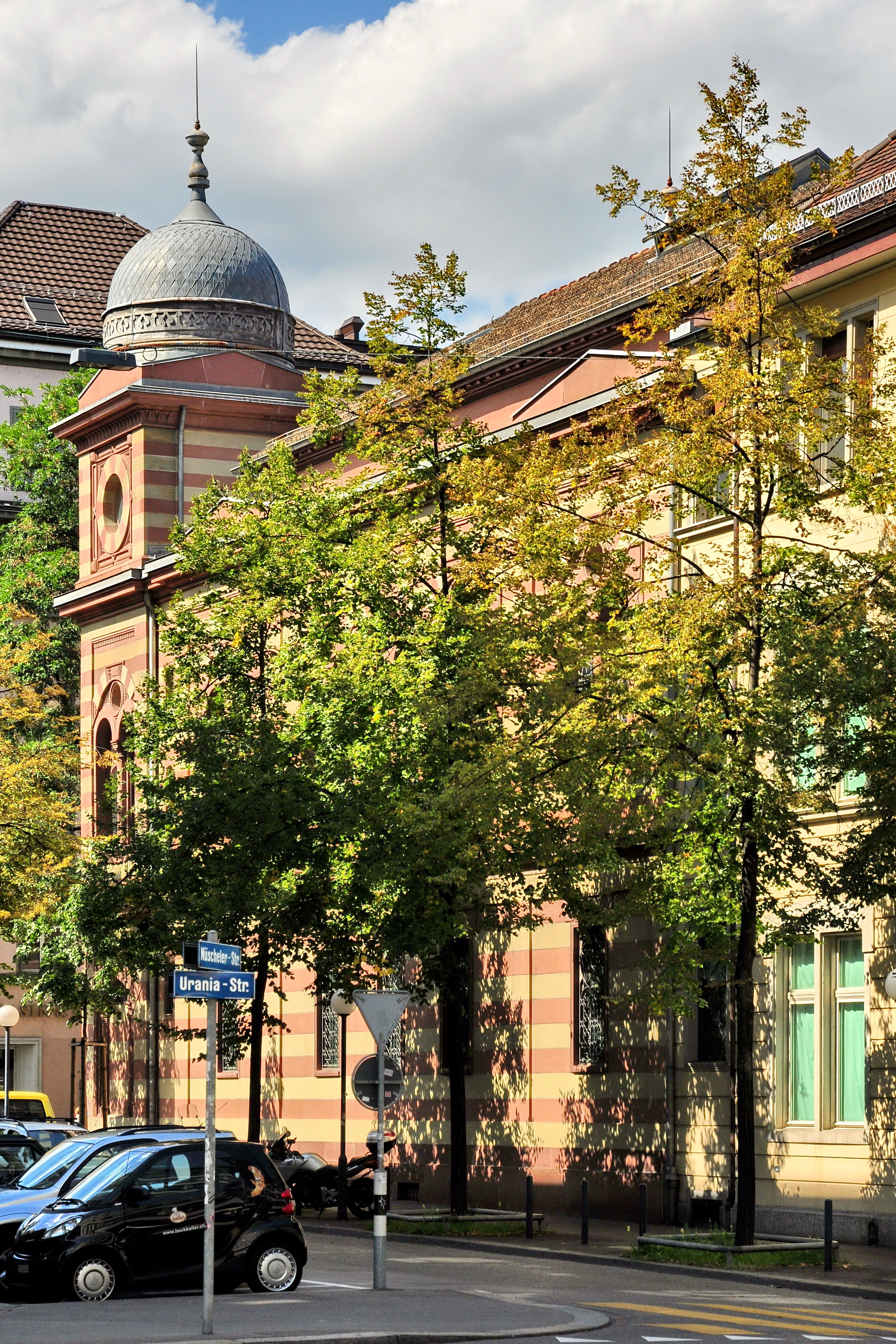 Synagoge der Israelischen Cultusgemeinde, Löwenstrasse in Zürich-City (Switzerland)